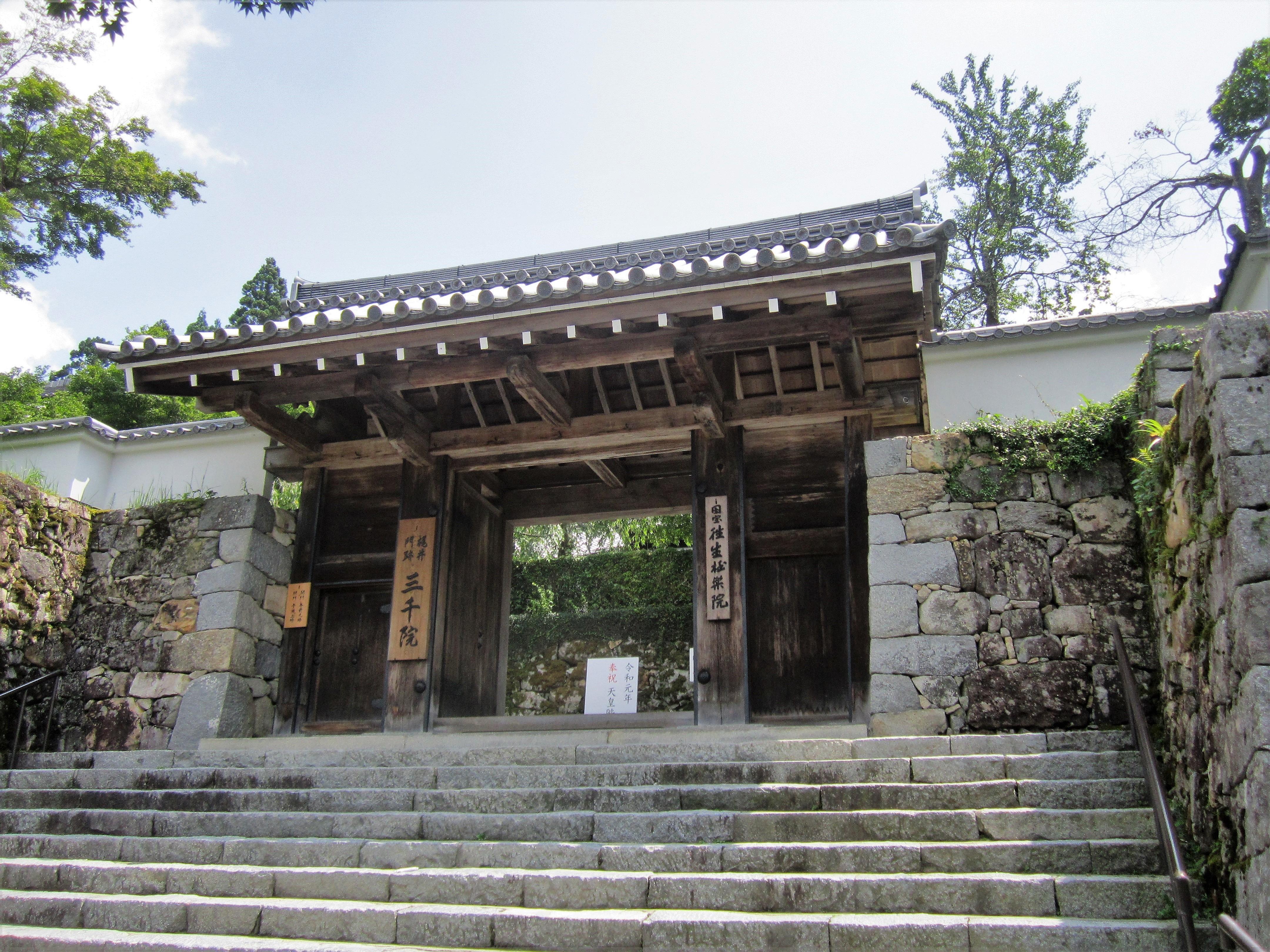 三千院 御殿門（京都市左京区大原来迎院町）